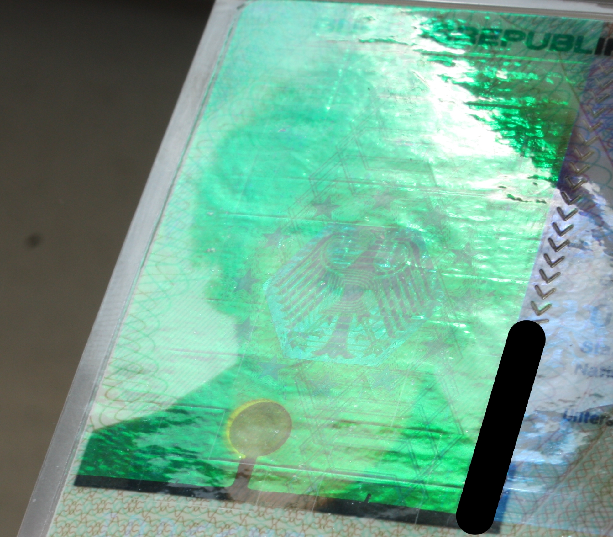 Hologramm auf dem Passbild am Personalausweis Deutschland